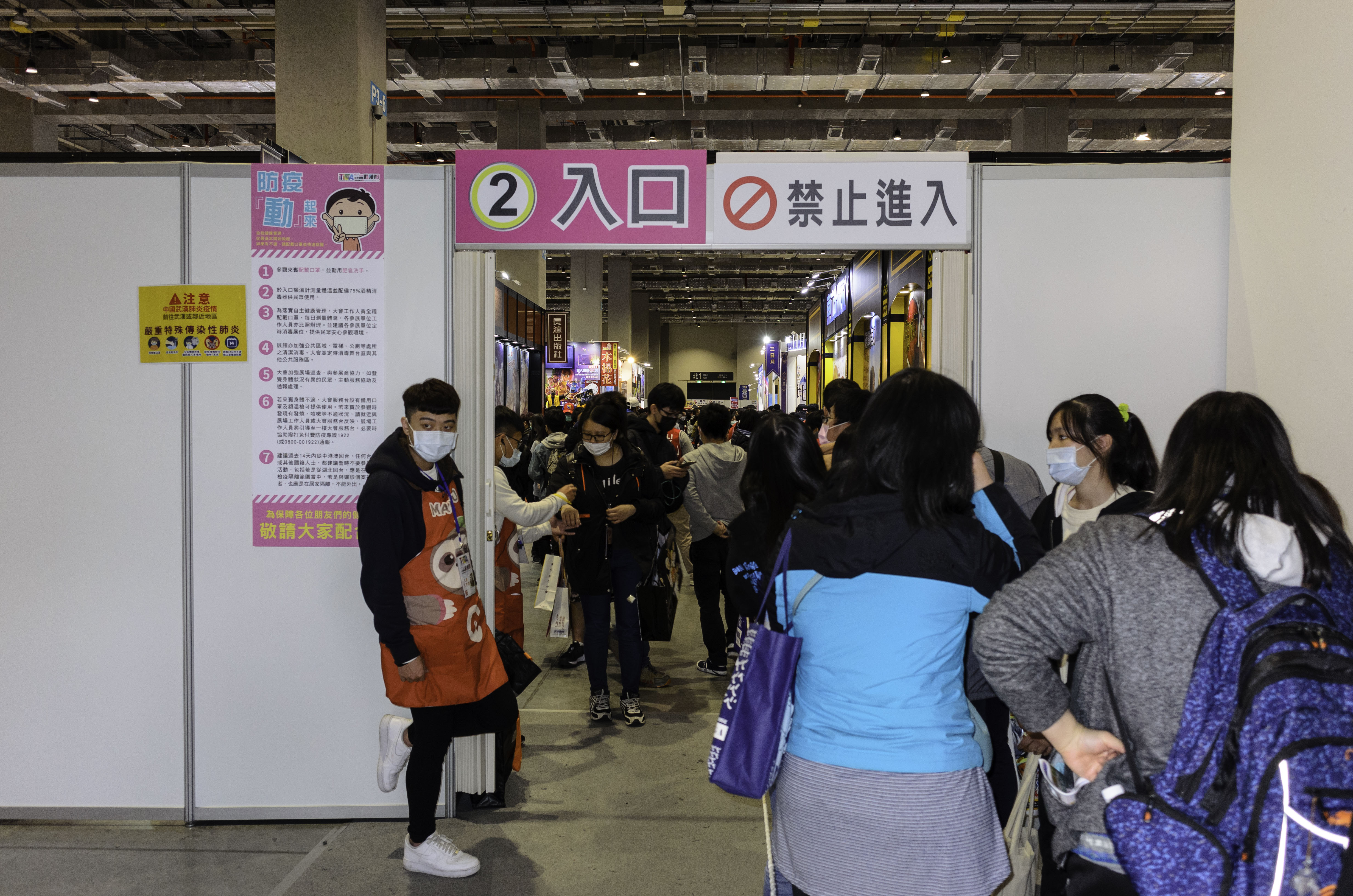 中文（台灣）: 2020台北國際動漫節2號入口。